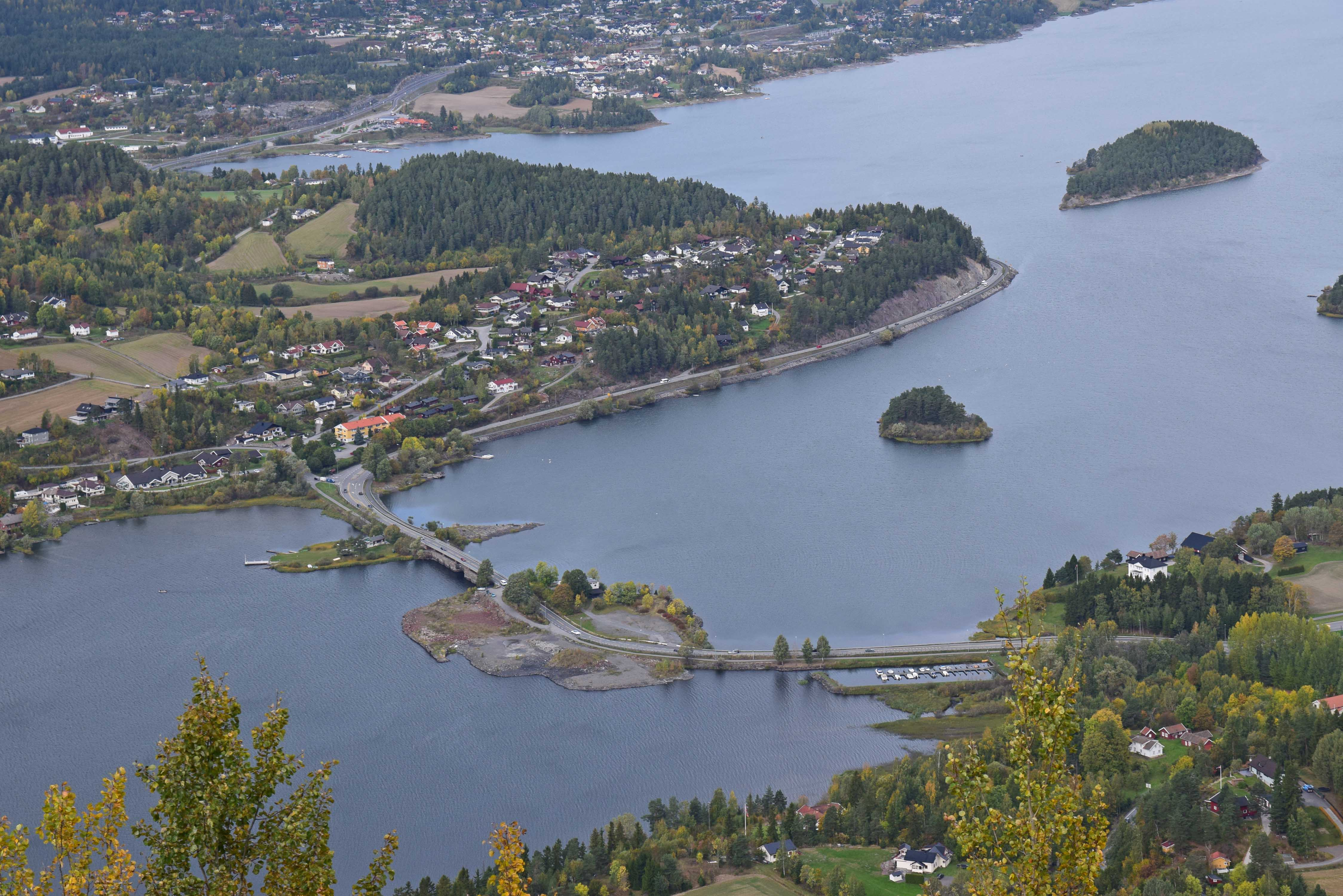 Sundvollen med Sundøya (den nærmeste og største) og Slettøya, Vik i Hole øverst i bildet